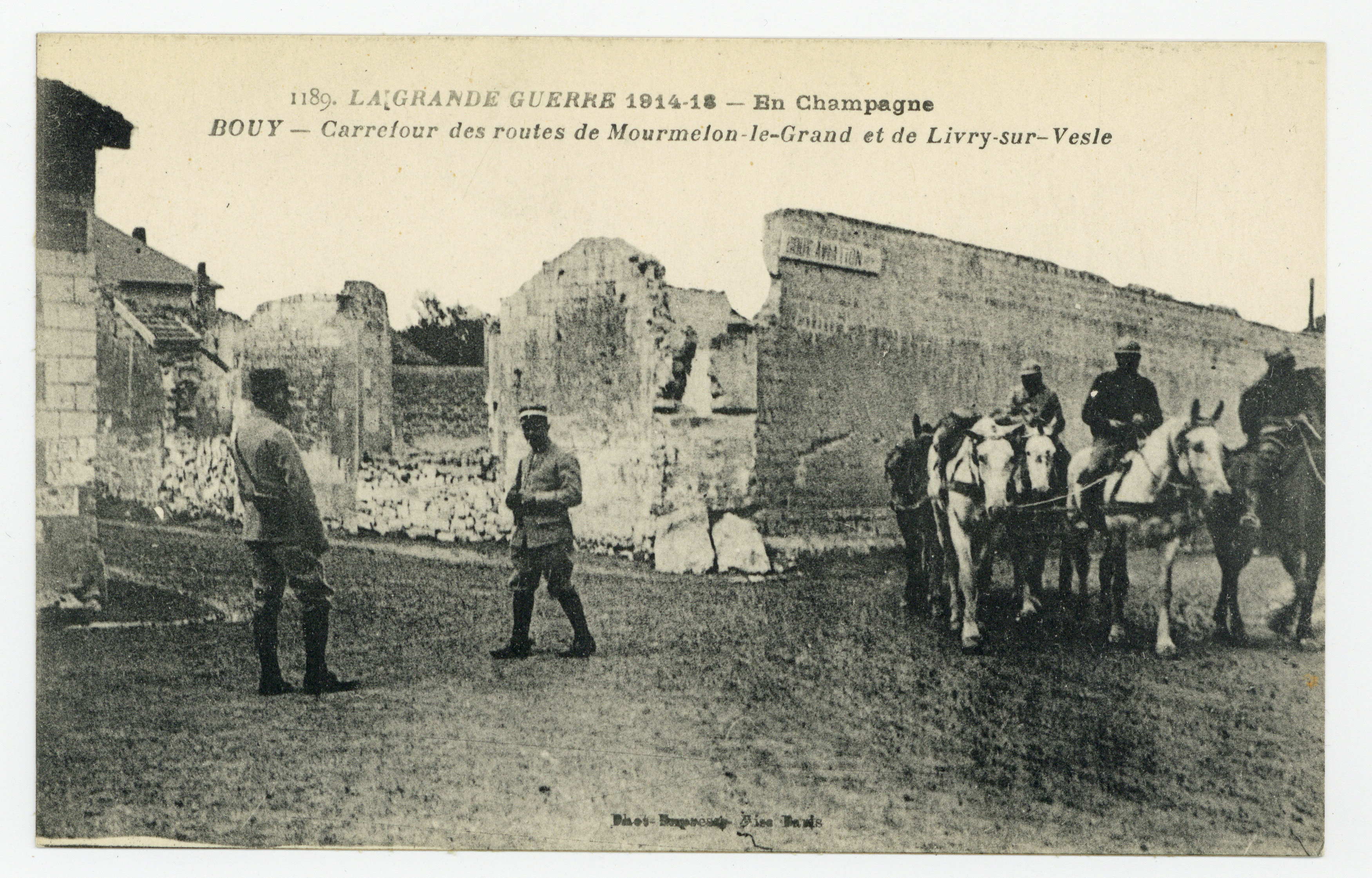 Une inscription imprimée au recto peu lisible : Visé Paris